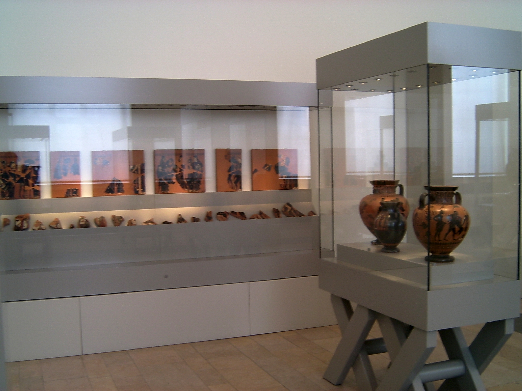 Grabpinakesfragmente des Vasenmalers Exekias, eine von 16 im schwarzfigurigen Stil bemalte Tontafeln, eine Prothesis (Totenklage) und einen Totenzug darstellend, gefunden auf dem Kerameikos in Athen, zwischen 540 und 530 v. Chr., 43 × 37 cm, Antikensammlung Berlin